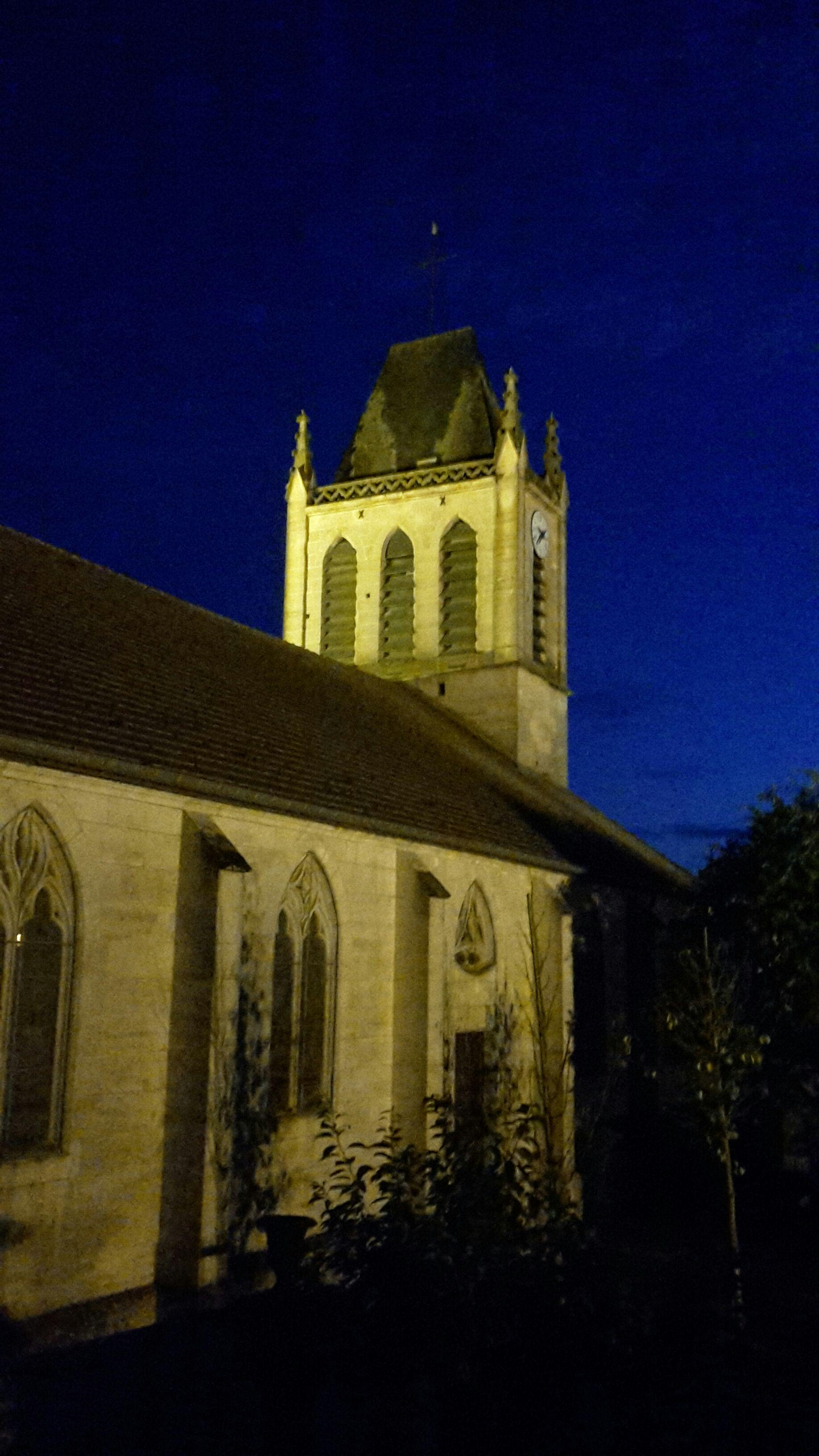 Très belle église du 18eme. Vue de nuit.